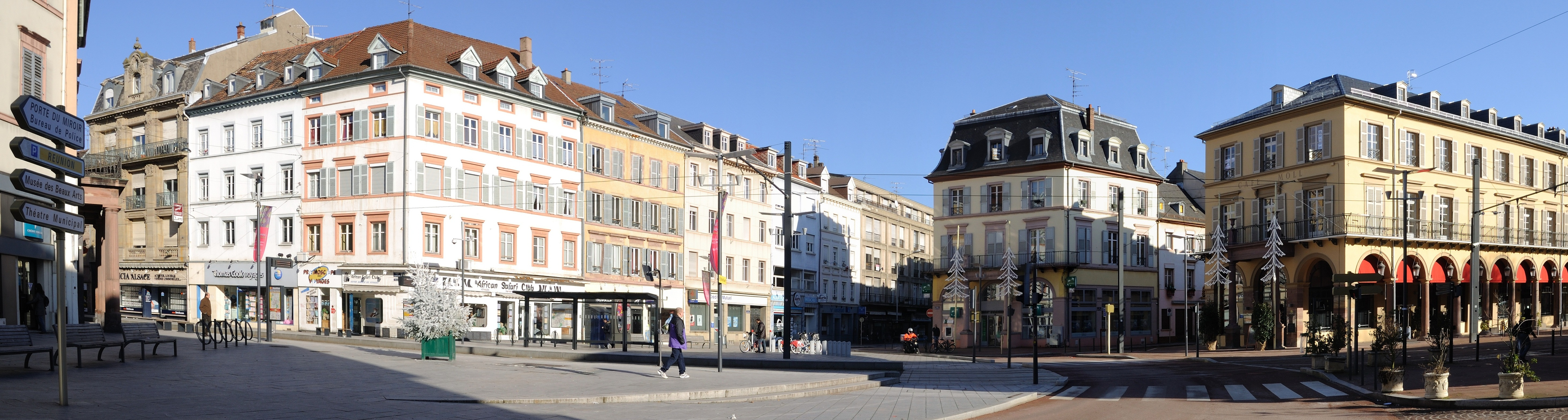 Mulhouse: Place de la République